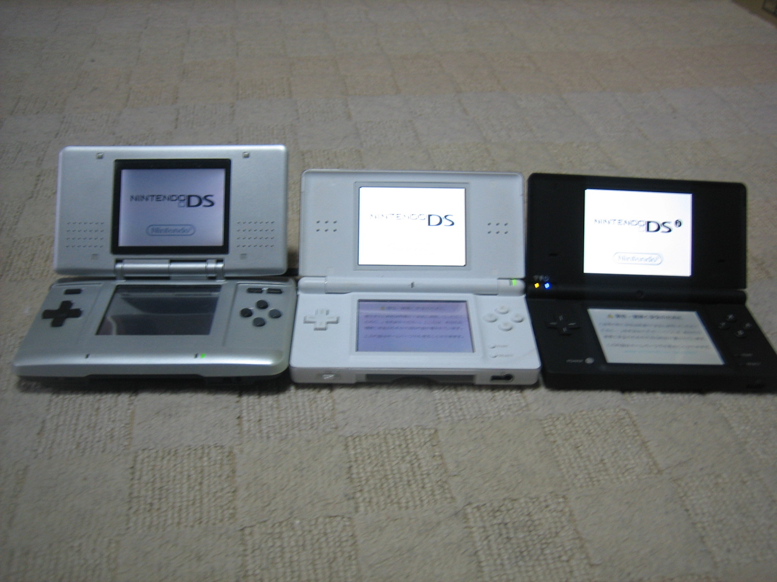 ニンテンドーDSシリーズ nintendo_ds_series